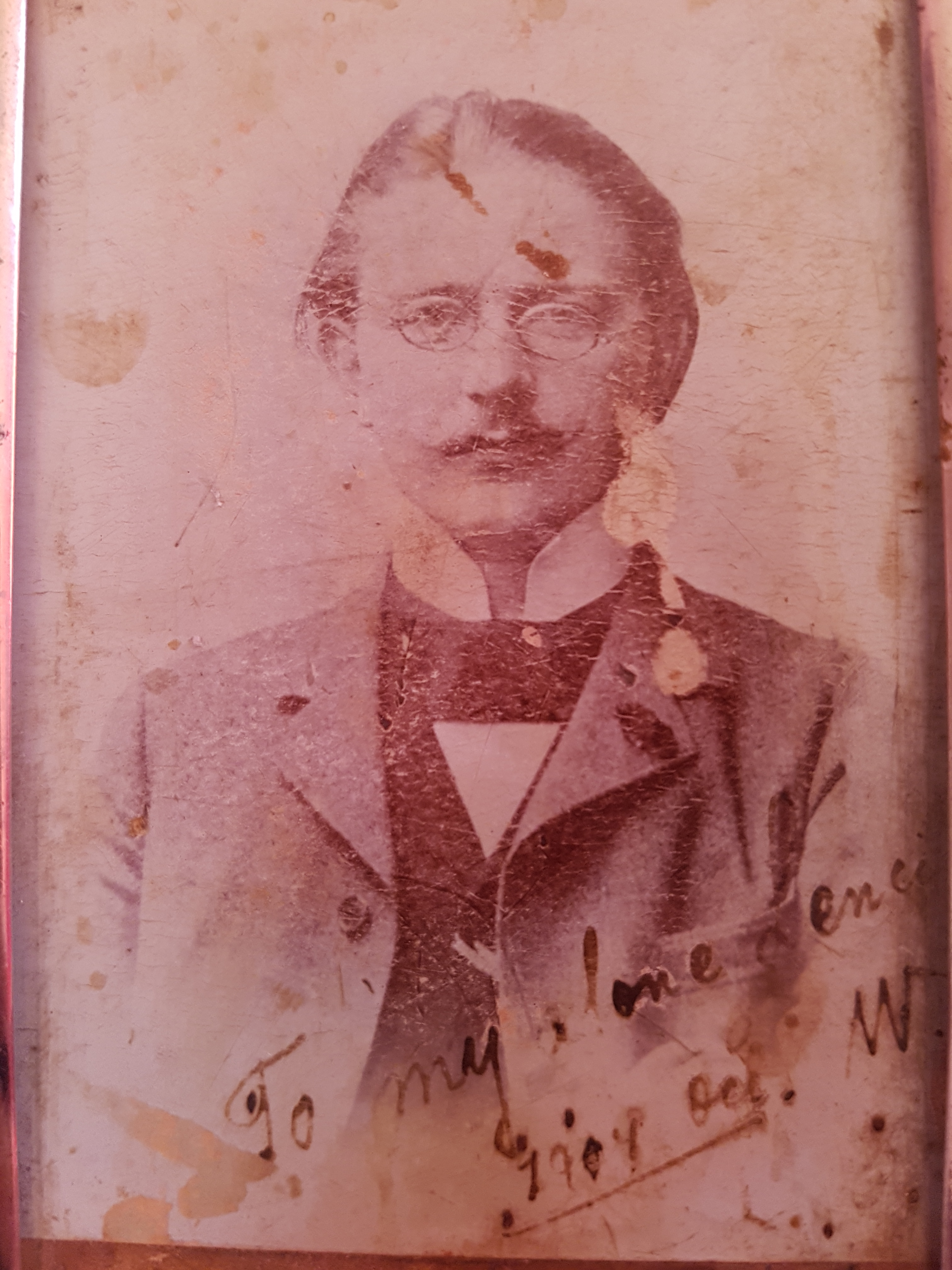 Cu dedicatie pentru sotie: Bogdanffy Lenke